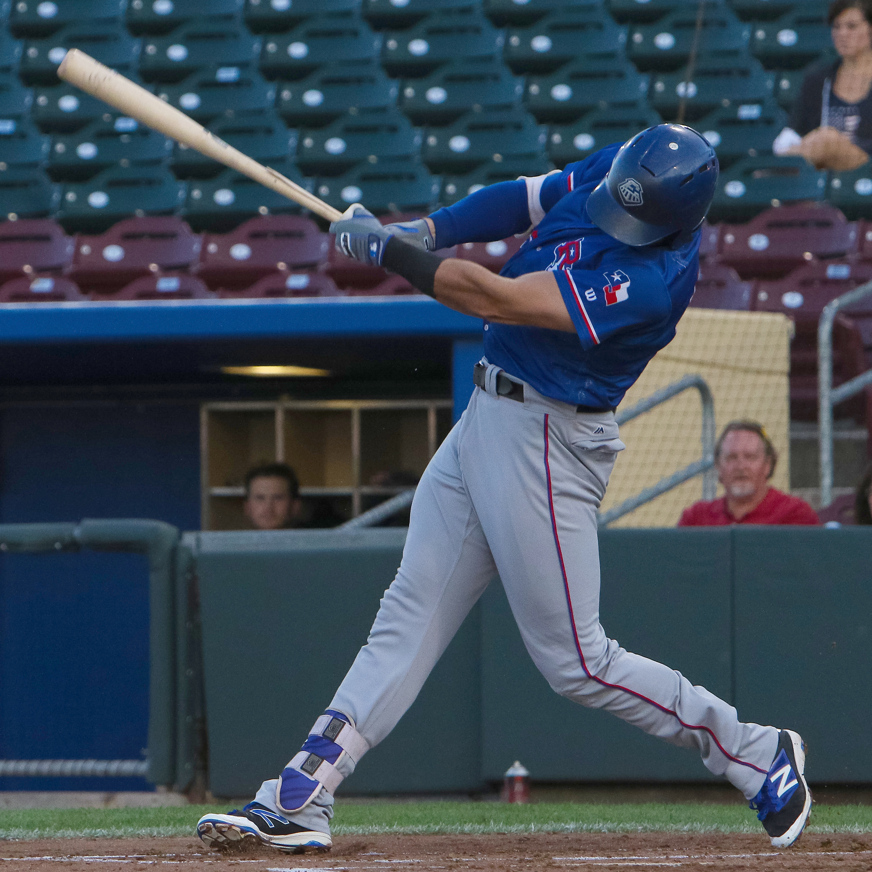 Joey Gallo